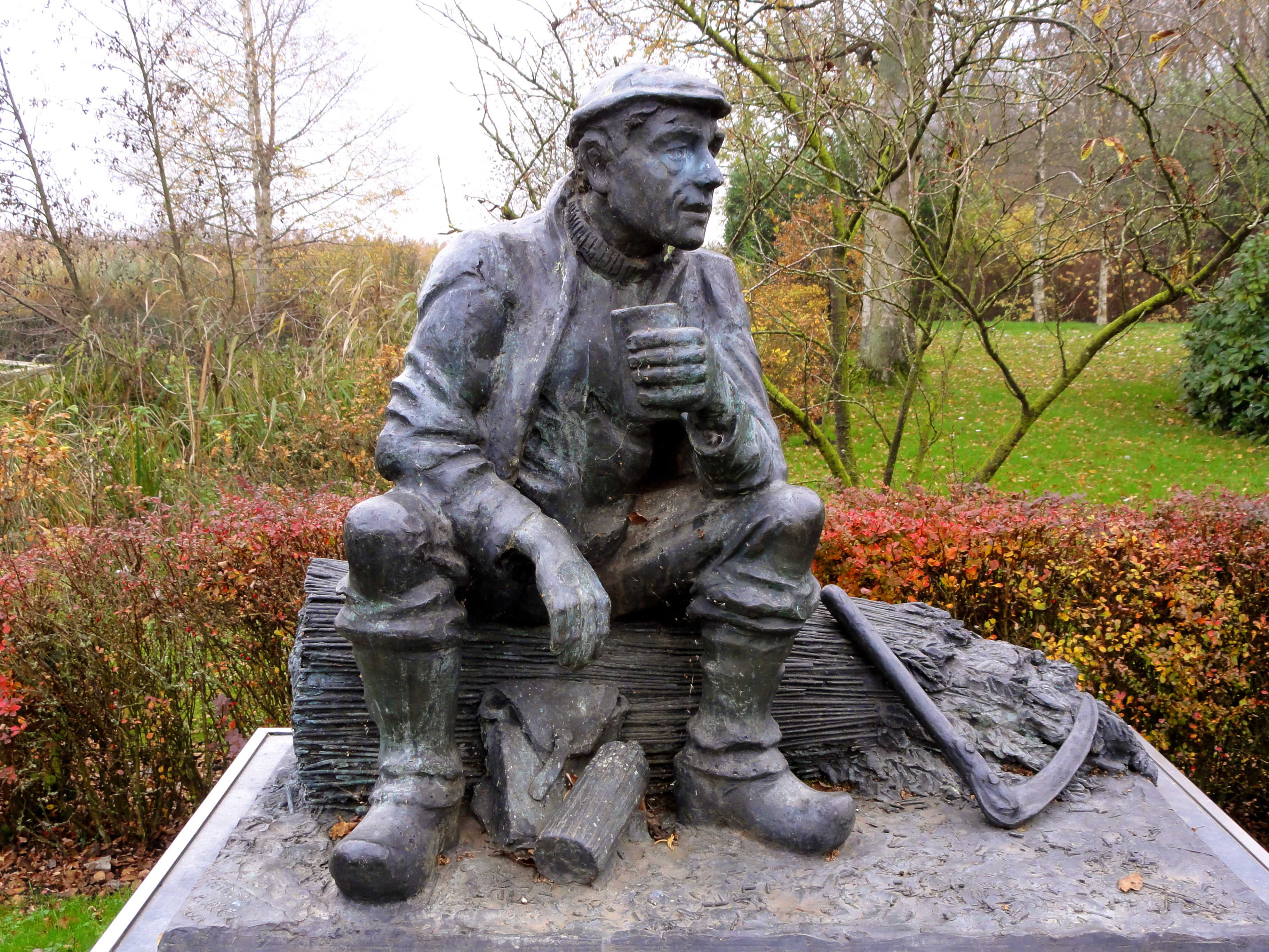 "In de Ribben" door Frits Stoop en Alie Jager in Kalenberg - geschenk van de oude gemeente IJsselham aan de inwoners van Kalenberg bij de gemeentelijke herindeling in 2001